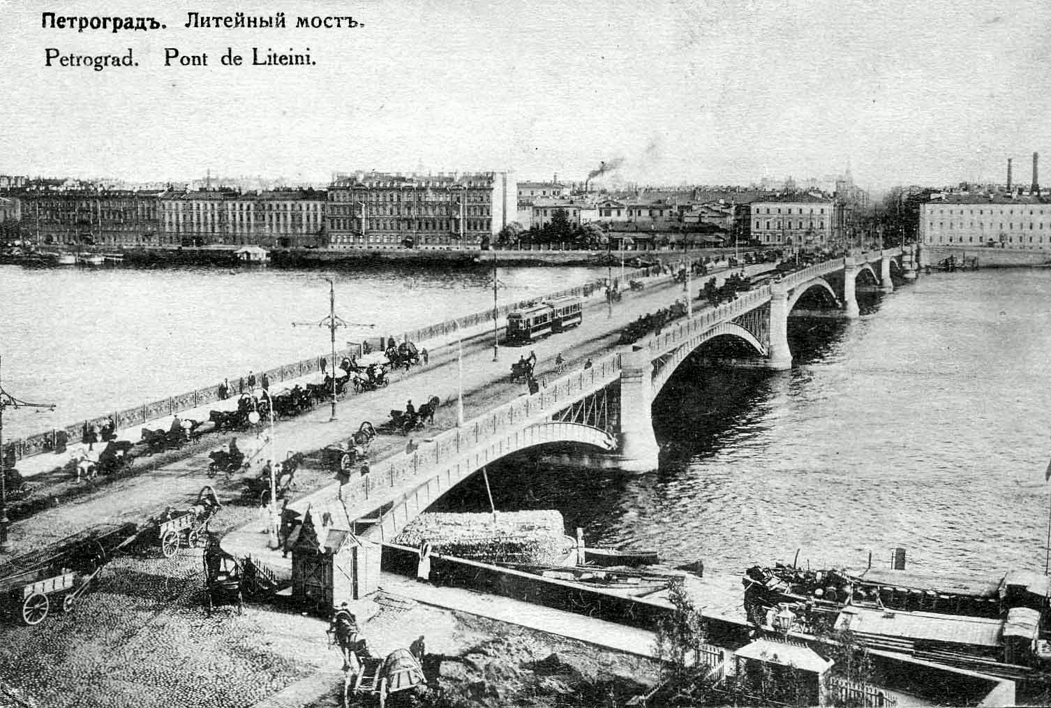 Арочный Литейный мост через р. Неву в Санкт-Петербурге